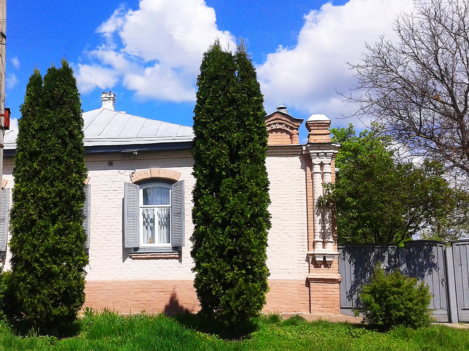 Будинок 1908 року в Прилуках (вул. Соборна)